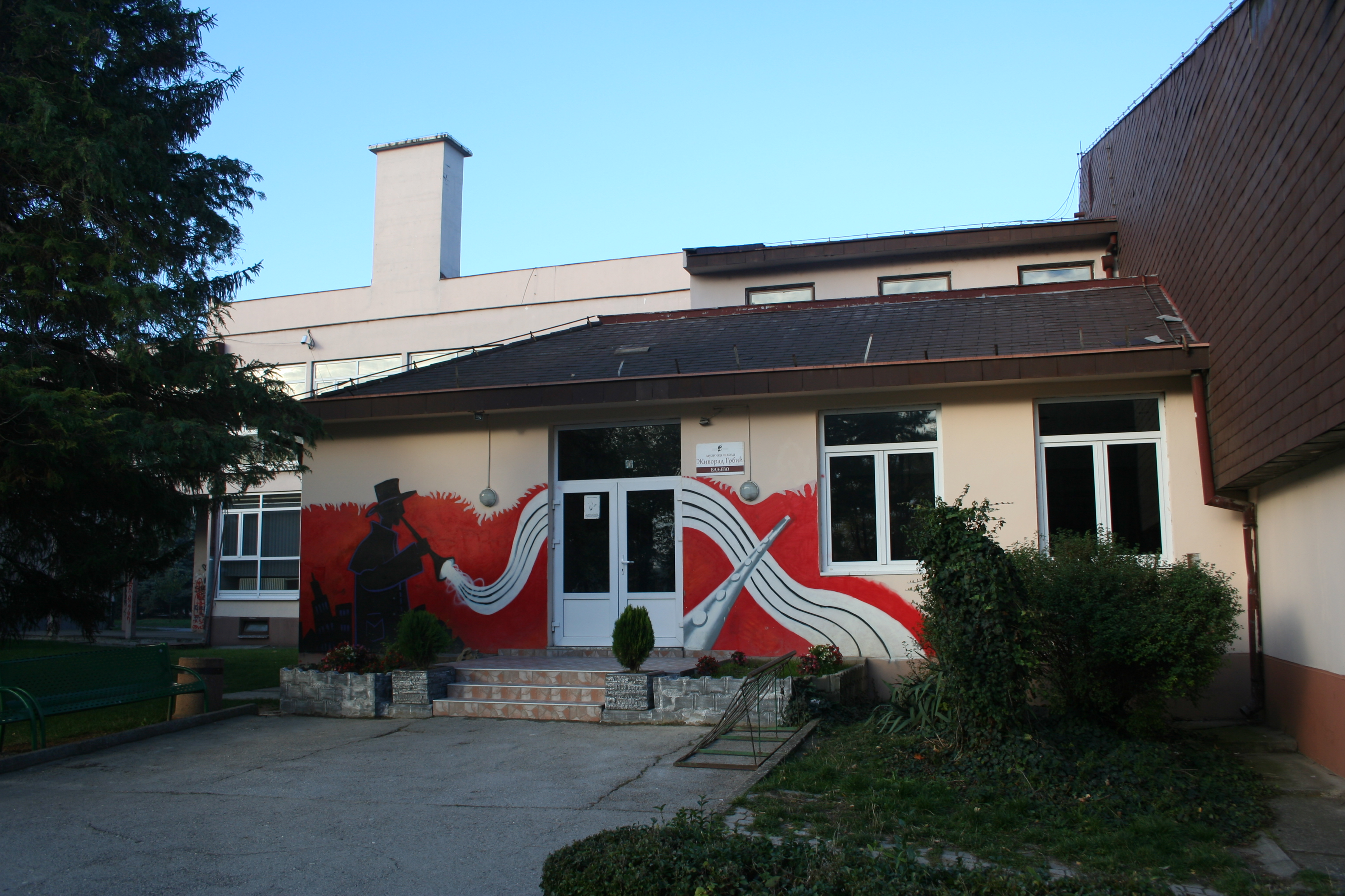 Muzička škola Valjevo